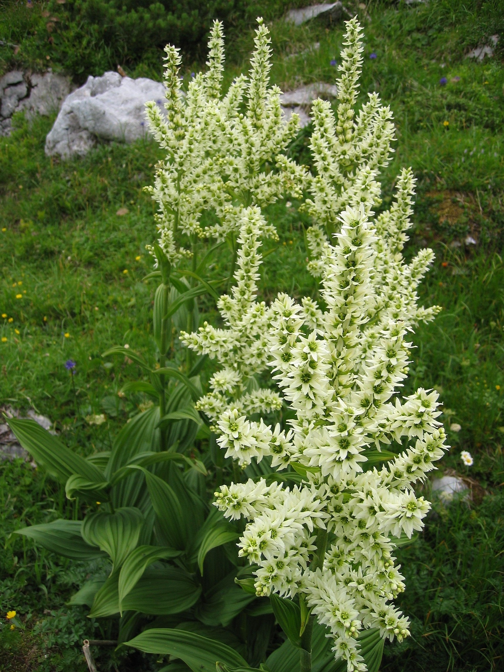 Veratrum album Dachstein ~2000m, Upper Austria, Austria